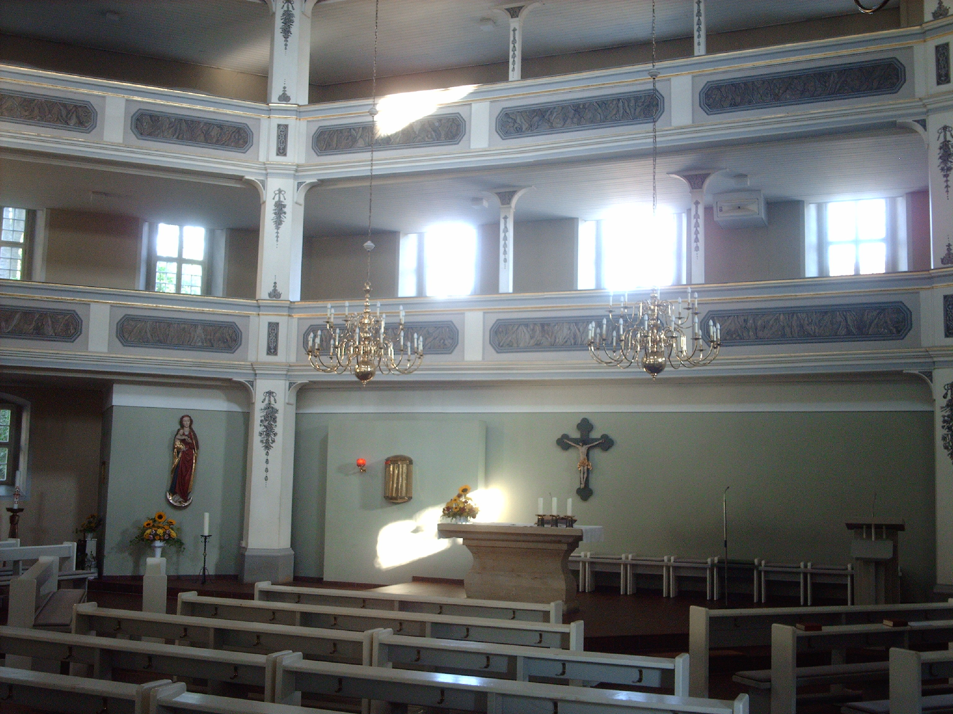 Himmelfahrtskirche (Gottesackerkirche) in Arnstadt, Inneres.